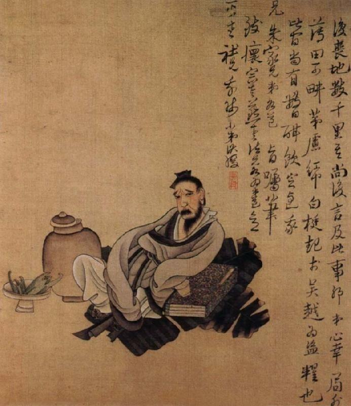 中國作家張岱